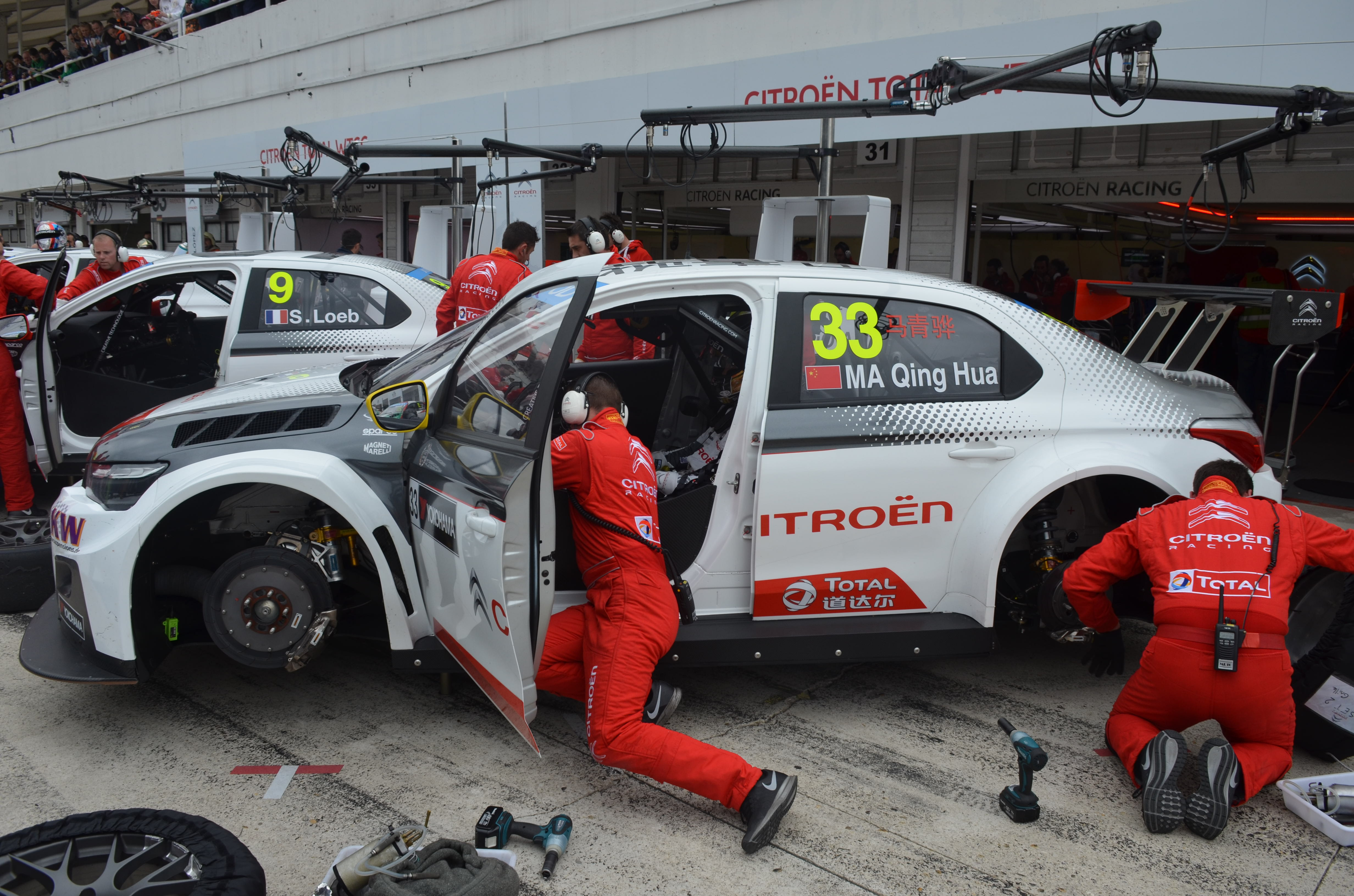 Ma Csing-hua a túraautó-világbajnokság 2015-ös magyar versenyén.